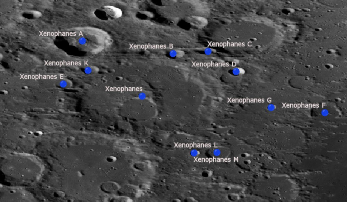 Cráter lunar Xenophanes. Cráteres satélite. (Imagen LRO)